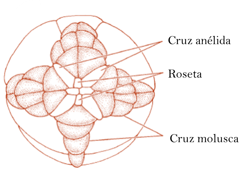 Patrones tardíos de segmentación